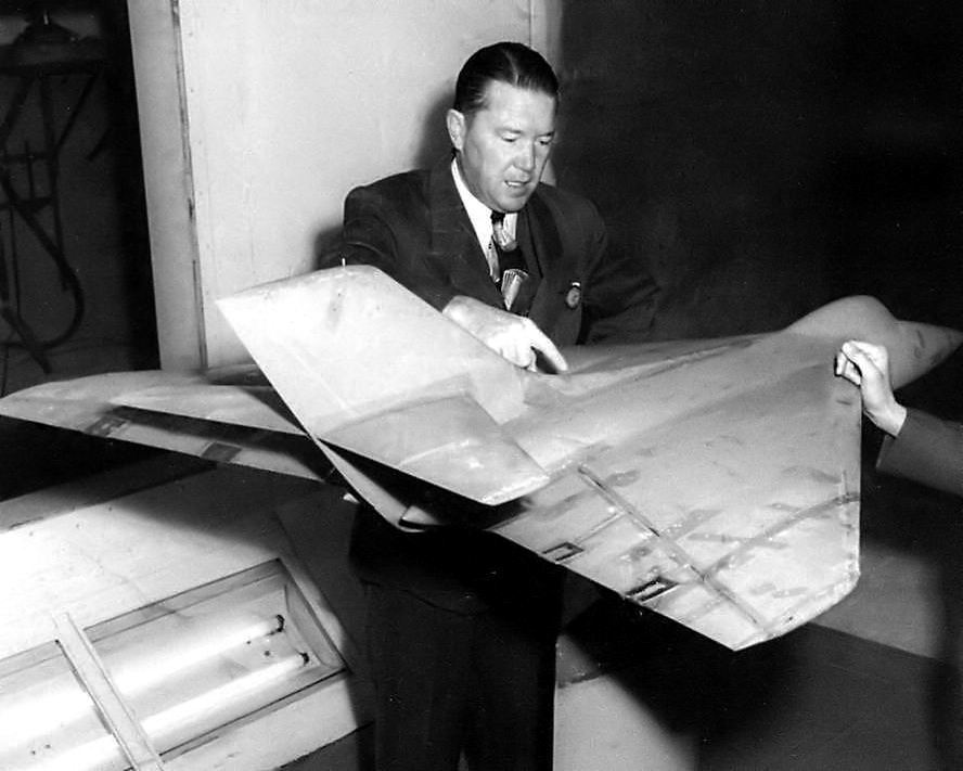 maquette du McDonnell model 36 futur XP-88